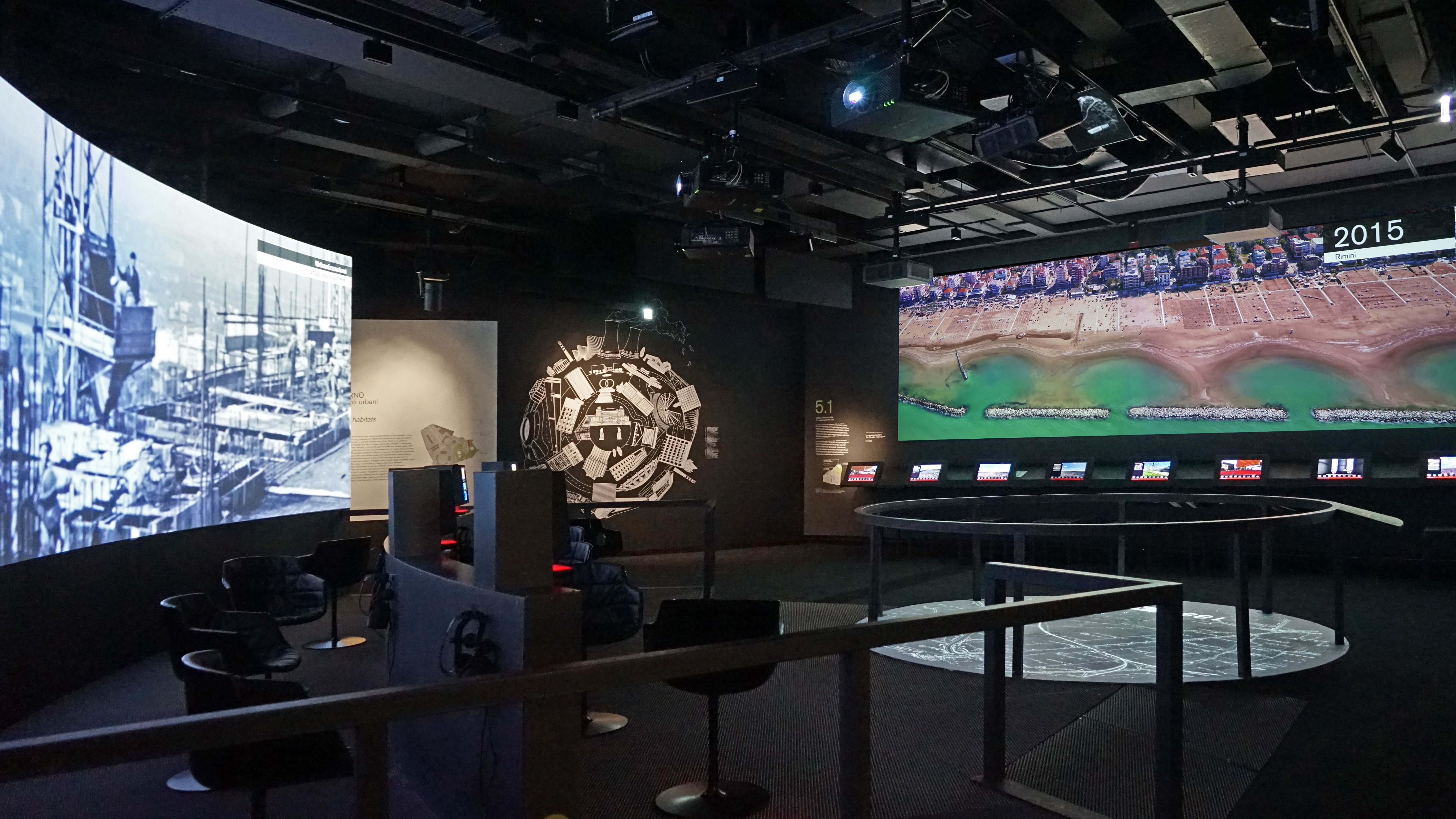 Deux sous-ensembles du thème 5 (Paysages et agglomérations urbaines) au 2ème étage de l'exposition permanente sous-thème 5.1 : "I'm moving to the city" sous-thème 5.3 : "It used to be countryside here" avec casques de réalité virtuelle. Le M9 a pour but explicite de "parcourir le passé (NDLR de l'Italie), comprendre le présent et imaginer le futur". C'est un musée de la civilisation italienne du 20è siècle, sans collection d'objets, dans lequel les thématiques sont traitées exclusivement de manière multimédia. Les dispositifs numériques interactifs y sont très nombreux, dans les salles des deux étages de l'exposition permanente (2610 m2), ce qui est très attractif pour un public jeune. Un troisième étage (1400 m2) est consacré aux expositions temporaires. Le bâtiment possède un auditorium - cinéma 4K de 200 places équipé de casques de réalité virtuelle, une boutique-librairie, un restaurant, de vastes espaces d'accueil du public. C'est un musée ultra-moderne, pièce maîtresse, d'un projet de rénovation urbaine du centre de Mestre, piloté par la "Fonzione di Venezia" et qui comprend également un centre commercial créé dans un ancien couvent, des magasins, des restaurants et cafés, animant le nouveau quartier. La partie permanente du musée M9 est organisée autour de 8 grands thématiques : 1. Démographie et structures sociales 2. Consommation, coutumes et modes de vie italiens. 3. Science, technologie, innovation 4. Économie, travail, production et bien-être 5. Paysages et agglomérations urbaines 6. L'État, les institutions, la politique 7. Éducation, formation et information 8. L'identité italienne. Les thématiques sur le site du M9